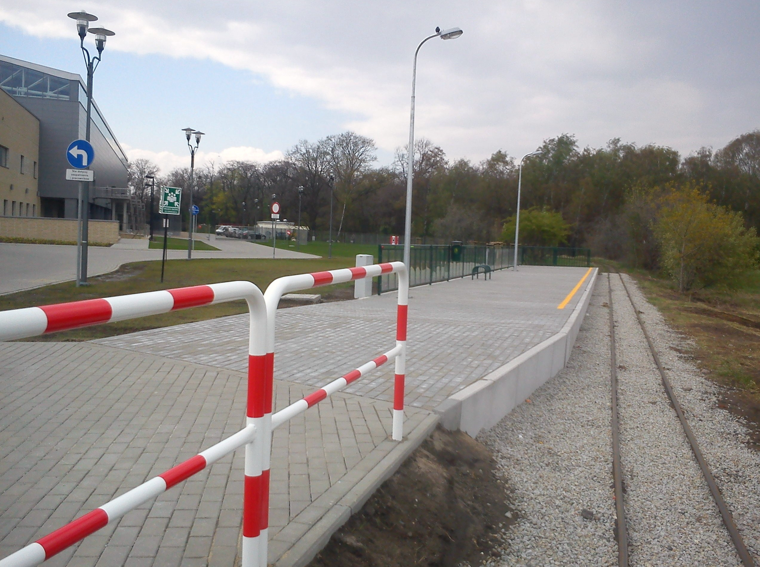 Przystanek kolei parkowej Maltanka - Termy Maltańskie. Poznań.